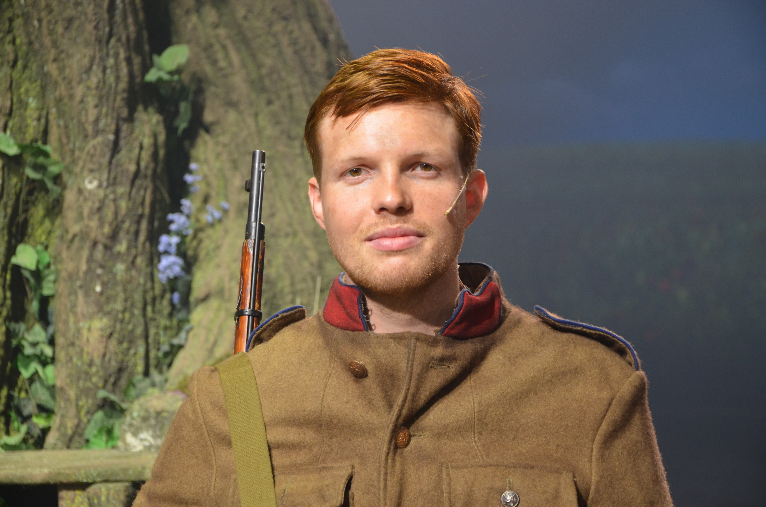 Jelle Cleymans tijdens de open repetitie van de spektakelmusical 14-18.